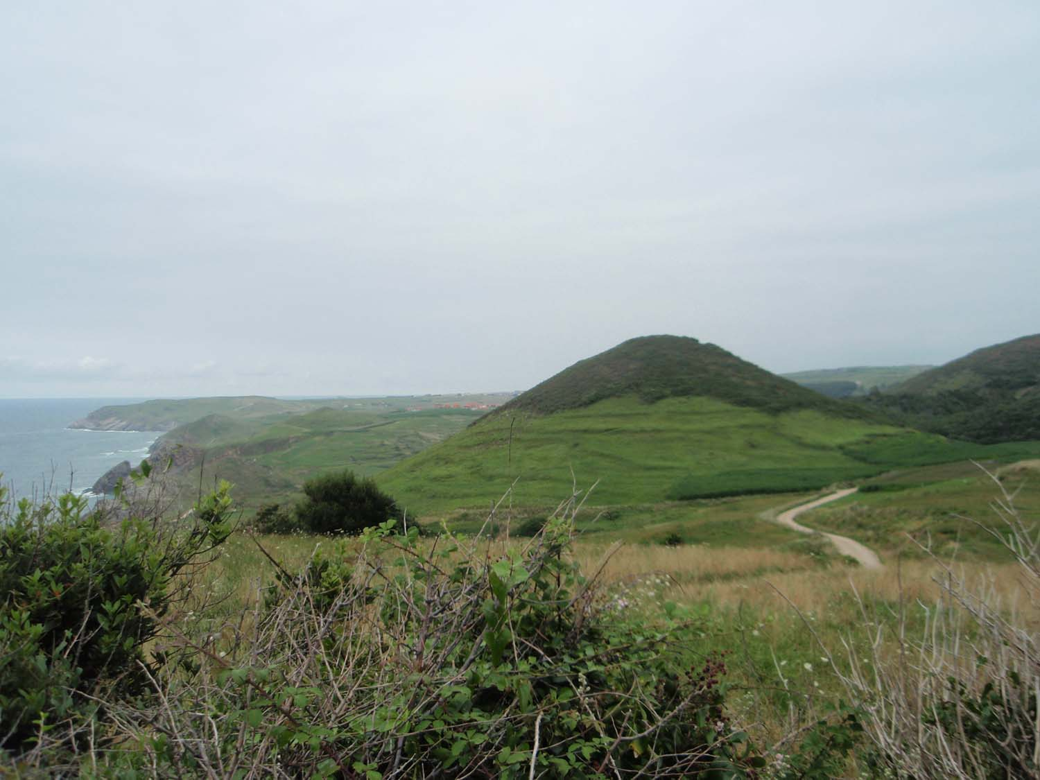 Vista del litoral del municipio de Santillana del Mar, en Cantabria (España).